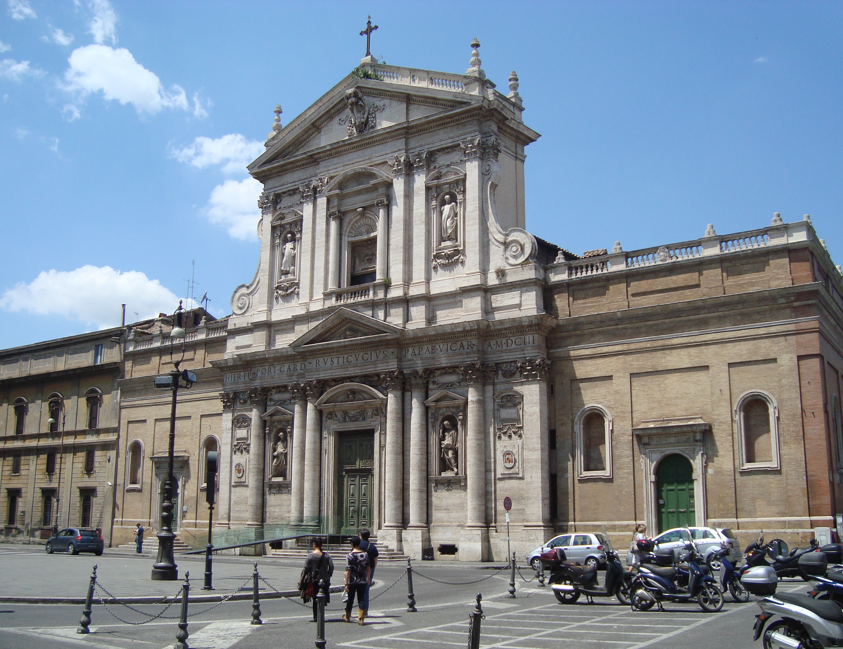 Eglise Santa Susanna alle Terme de Rome